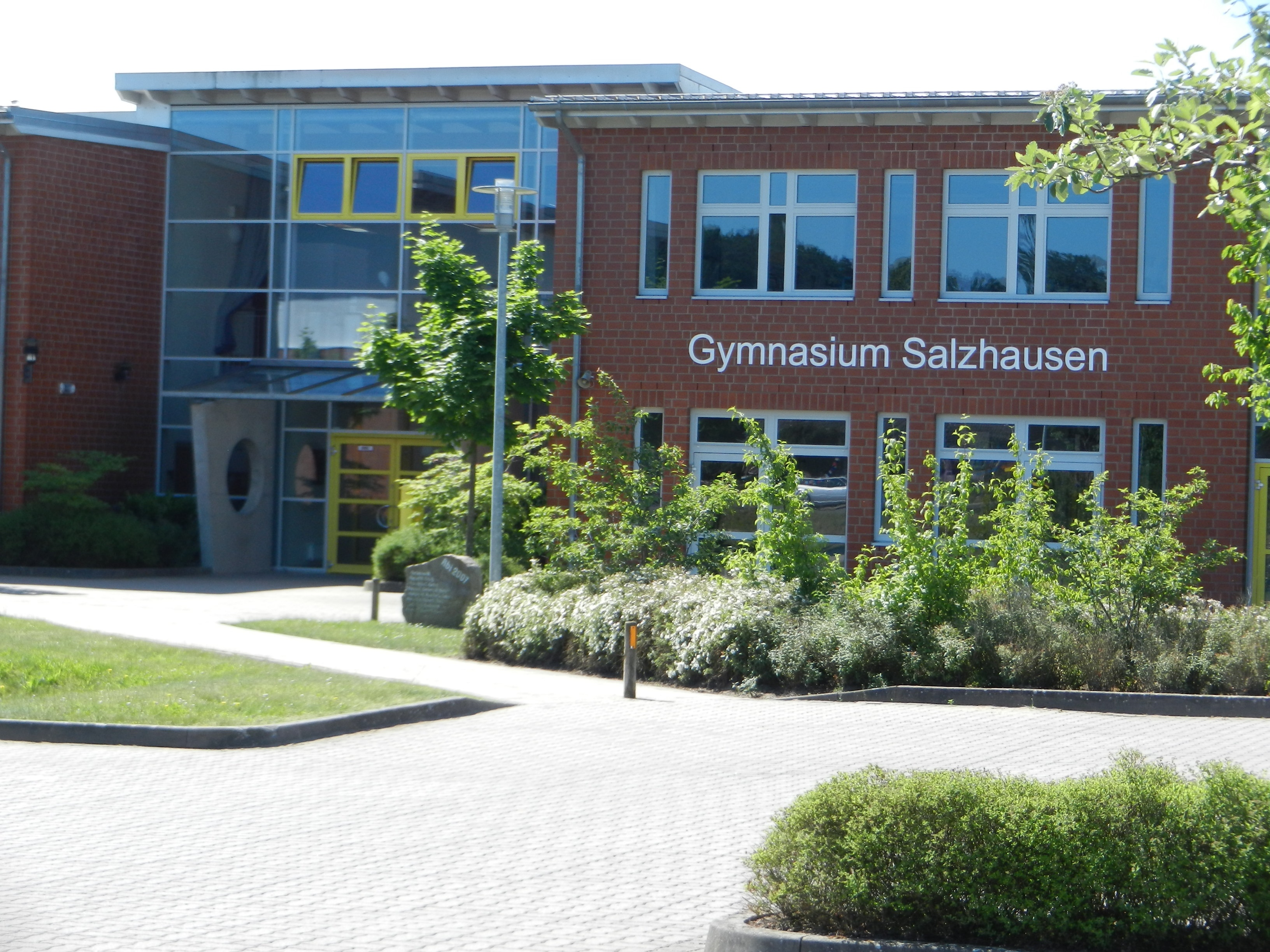 Ingang vun Gymnasium Solthusen